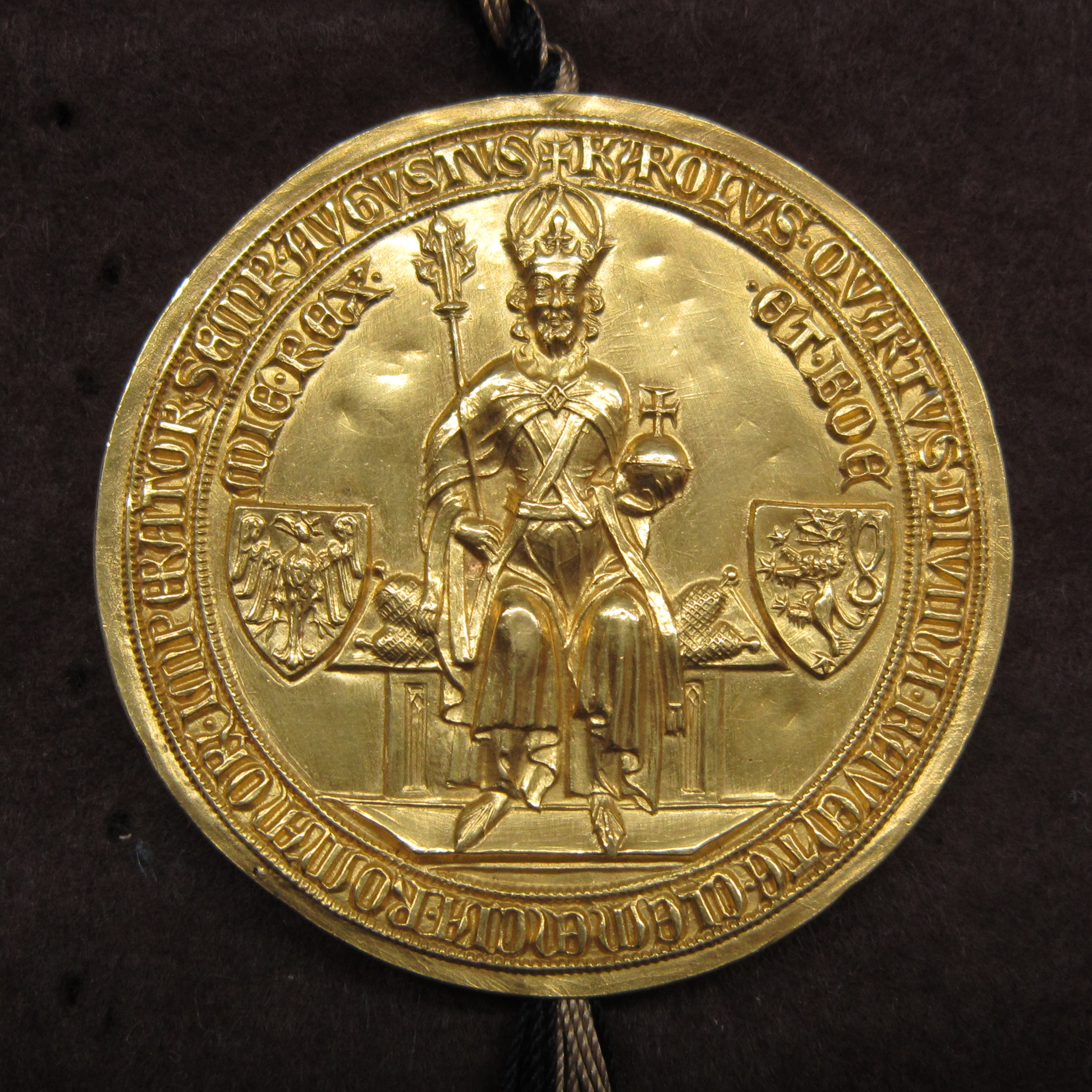 Vorderseite des Siegels des Trierer Exemplars der Goldenen Bulle mit dem Bildnis des Kaisers Karl IV.